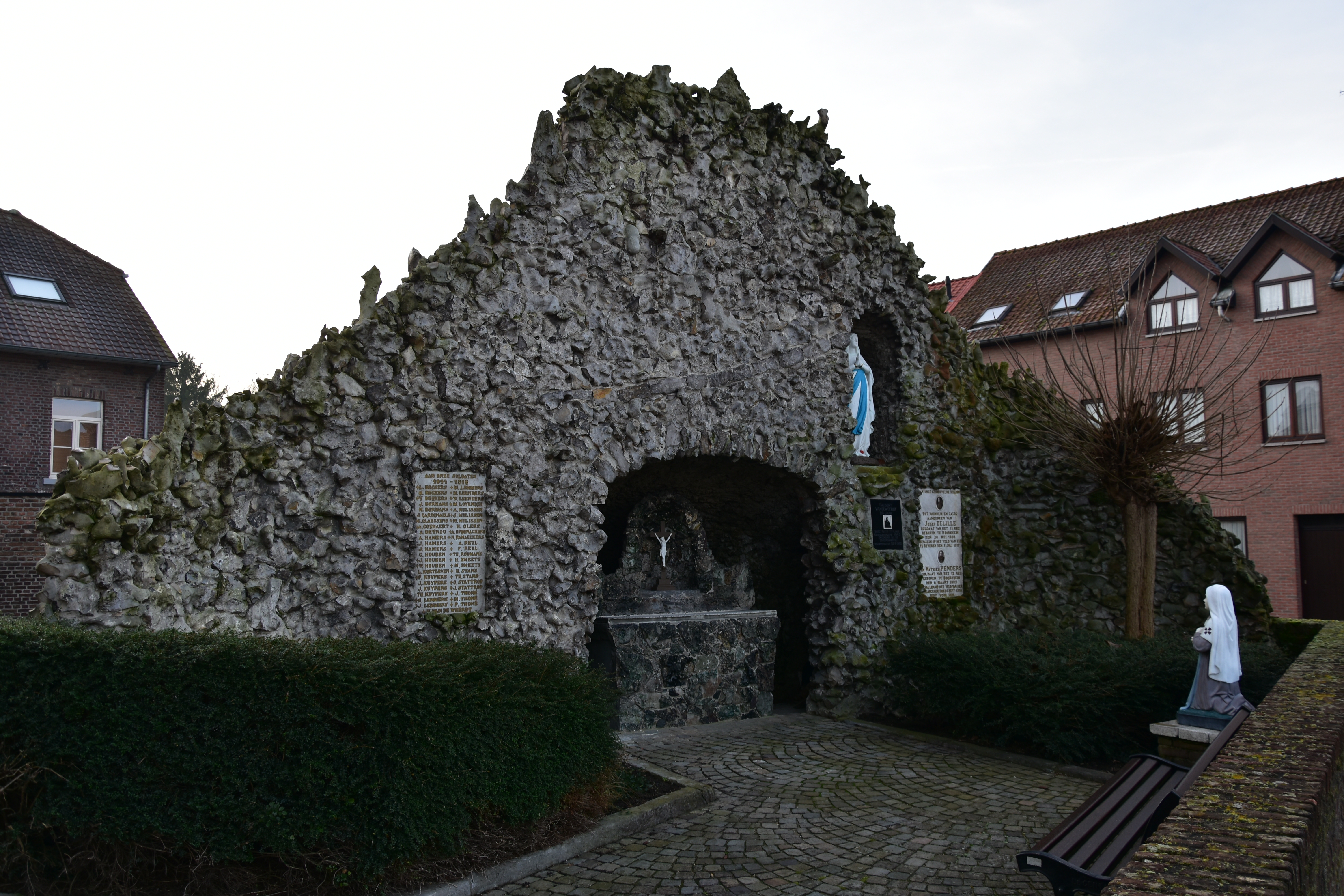 Boorsem Lourdesgrot 28-12-2019 9-57-47